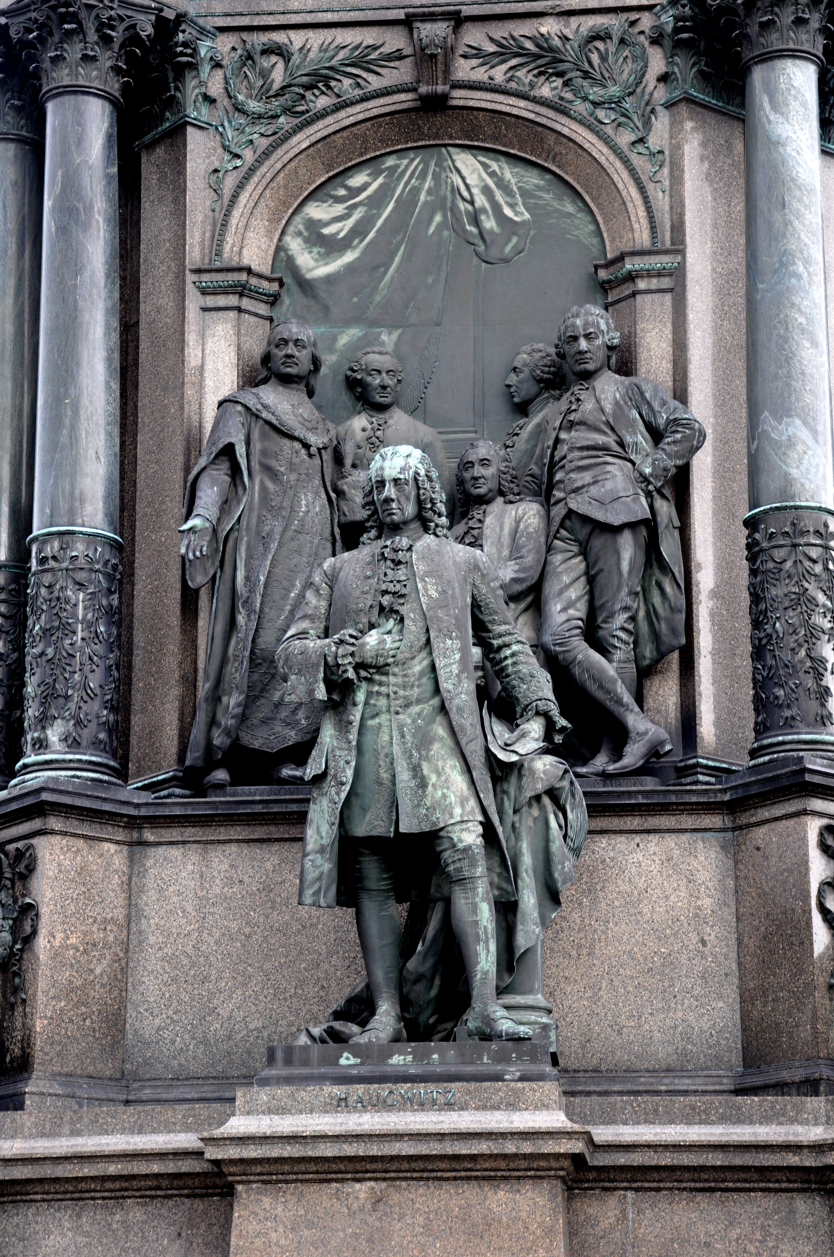 Wien, Maria-Theresien-Platz, Maria-Theresien-Denkmal von Kaspar von Zumbusch (1874–1888) - Verwaltung in einem Beratungszimmer in der Hofburg vorn: Friedrich Wilhelm von Haugwitz von links nach rechts: Antal Grassalkovich I. Samuel von Brukenthal Paul Joseph von Riegger Joseph von Sonnenfels Karl Anton von Martini